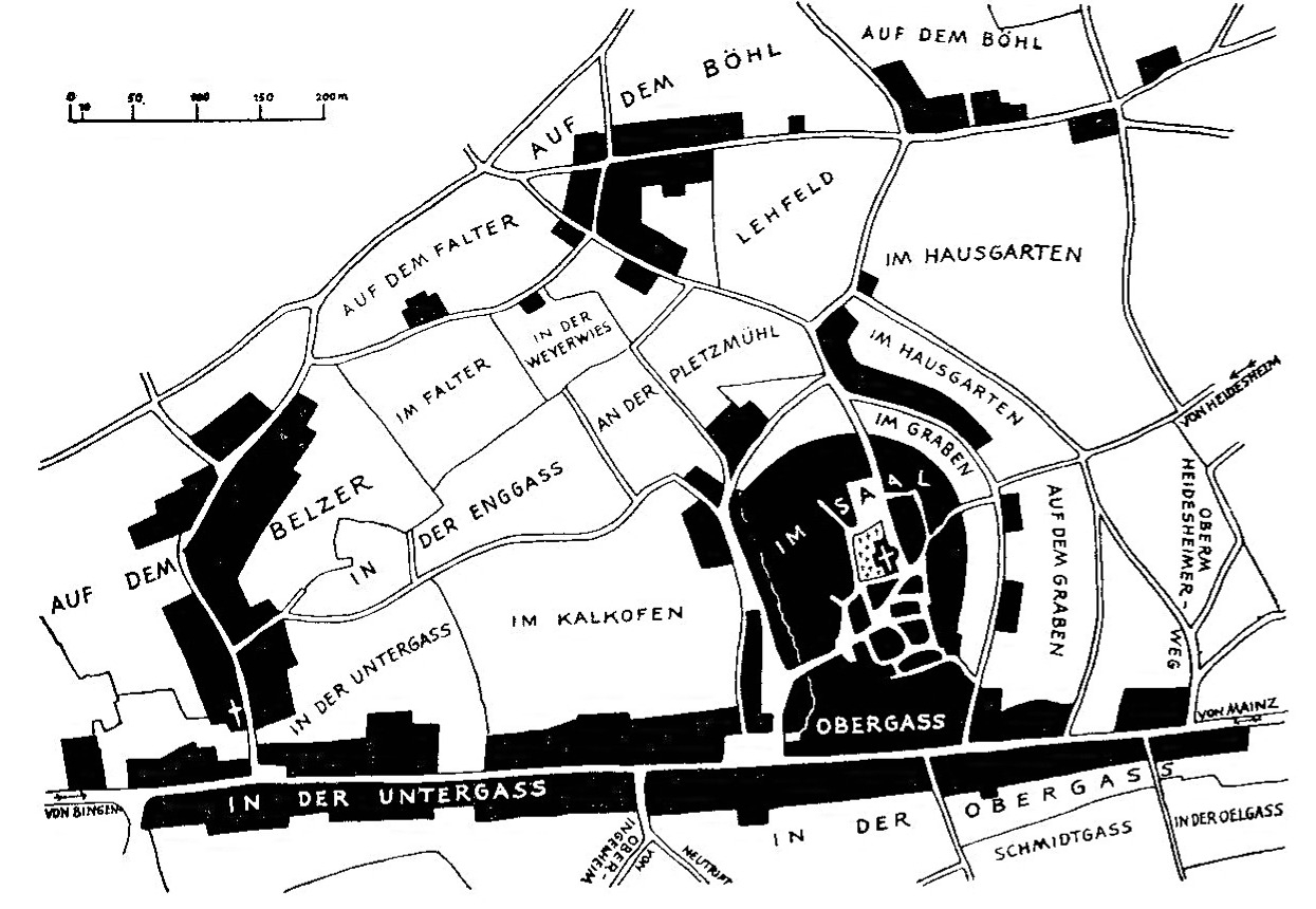 Stadtplan Nieder-Ingelheims 1840: Foto: Historischer Verein Ingelheim e.V. Mit Bestätigung des Historischen Vereins Ingelheims. Danke nochmal an dieser Stelle.